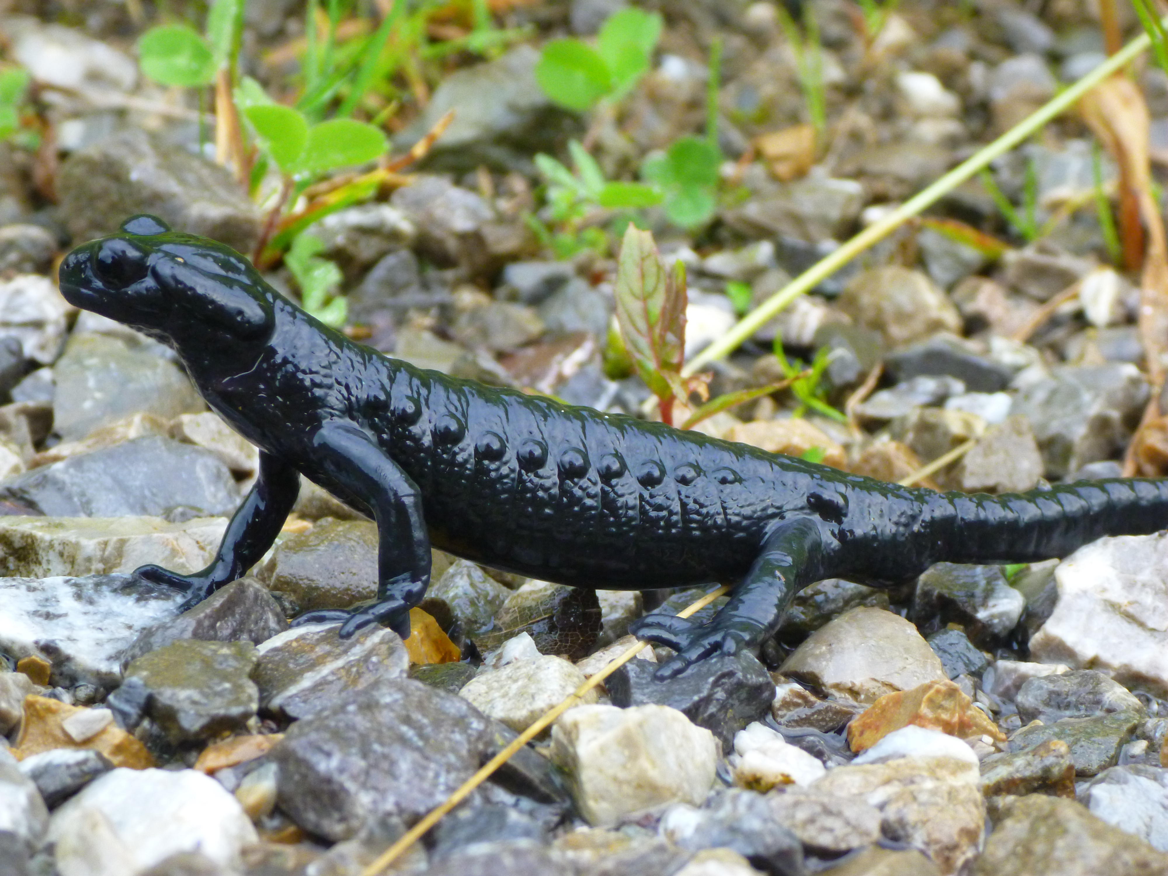 Alpensalamander, aufgenommen im Allgäu bei Schöllang